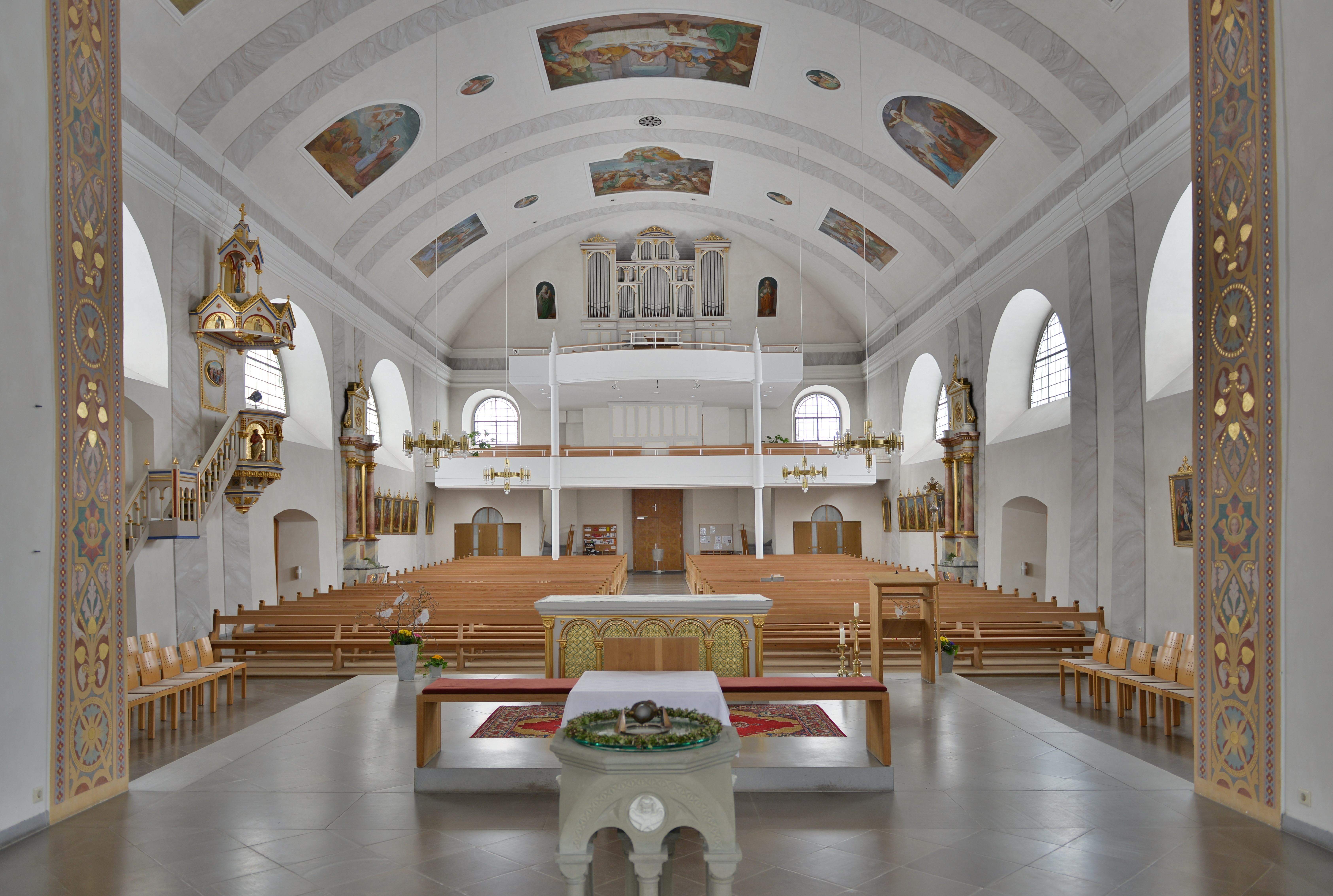 Pfarrkirche hl. Laurentius in Sulzberg, Vorarlberg. aus dem DEHIO Vorarlberg 1983: Umbau und Neubau des Langhauses 1828/29 nach Plänen von Alois Negrelli , Weihe 1833.